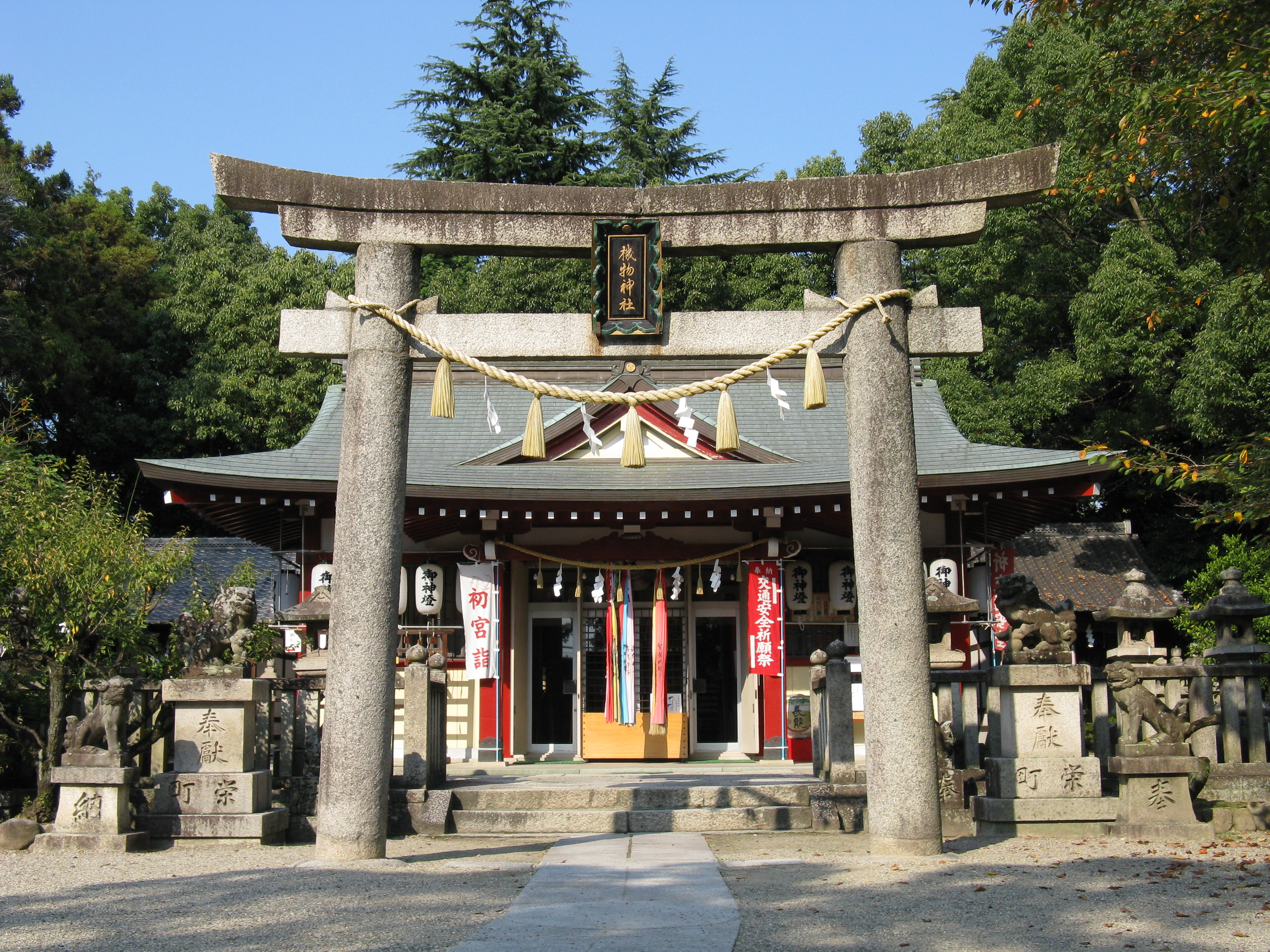 機物神社